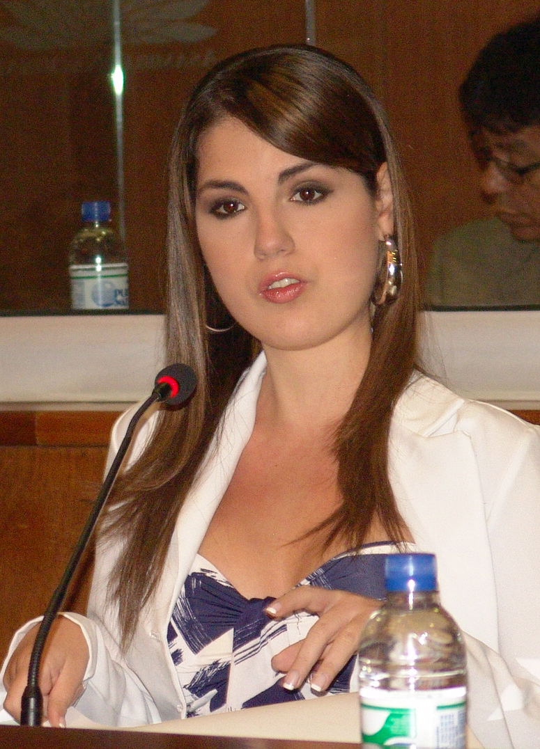 María Cristina Kronfle en 2009.